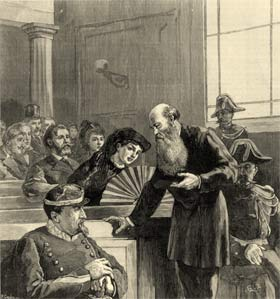 Kropotkine au "Procès des 66", impliquant 66 militants anarchistes, est une affaire politique jugée devant le tribunal correctionnel de Lyon le 8 janvier 1883.